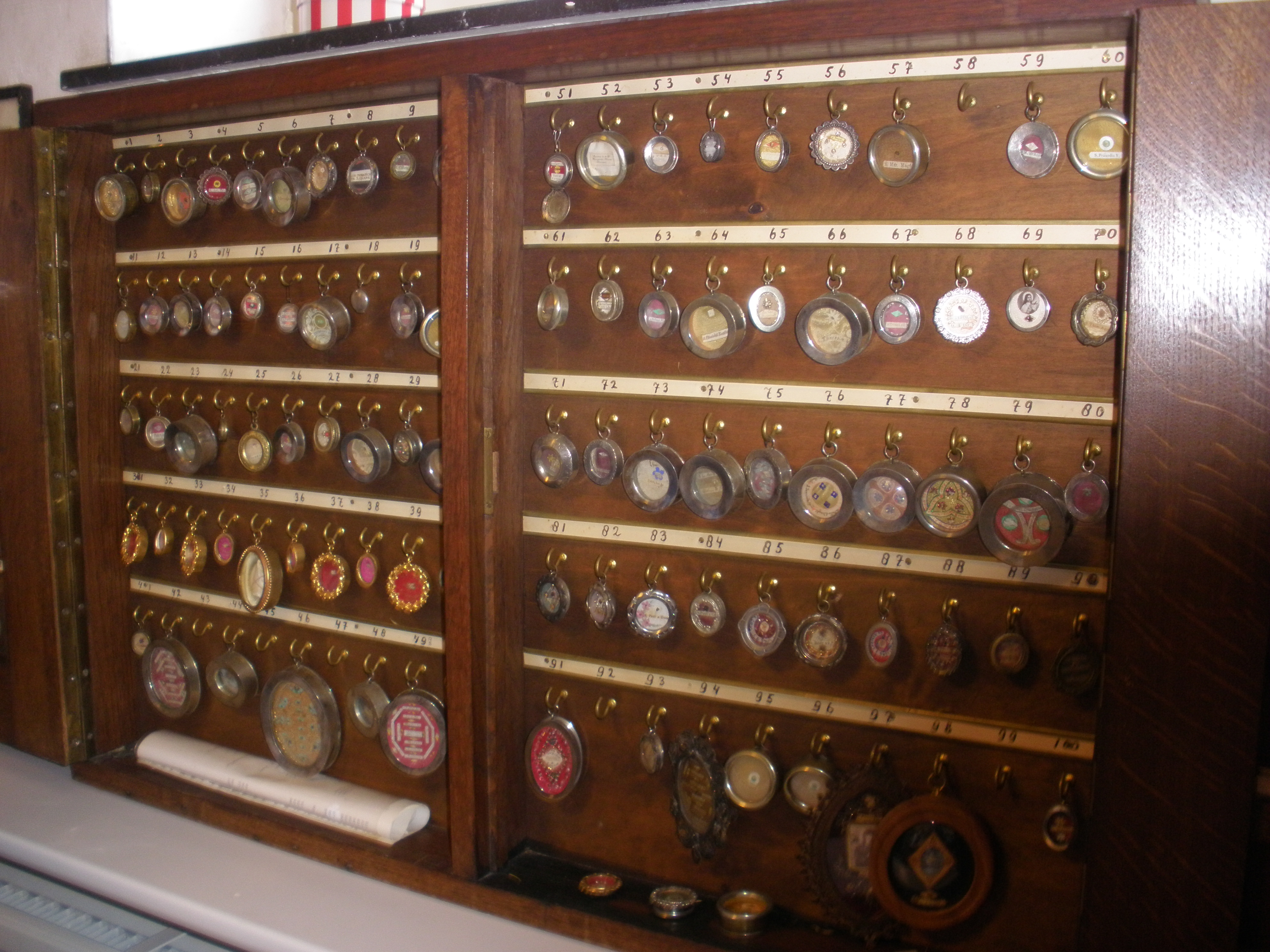 Kast met relikwieen in klooster en kerk Sint-Gabriël in Hekendorp.